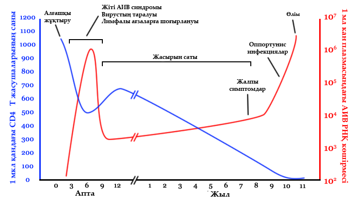 Main symptoms of acute HIV infection. Sources are found in main article: Wikipedia:Hiv#Acute_HIV_infection. To discuss image, please see Template talk:Human body diagrams